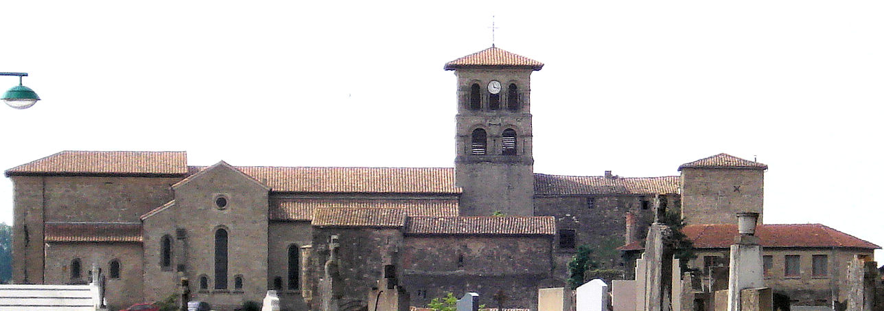 vue de la Collégiale de Saint Donat dans la Drôme